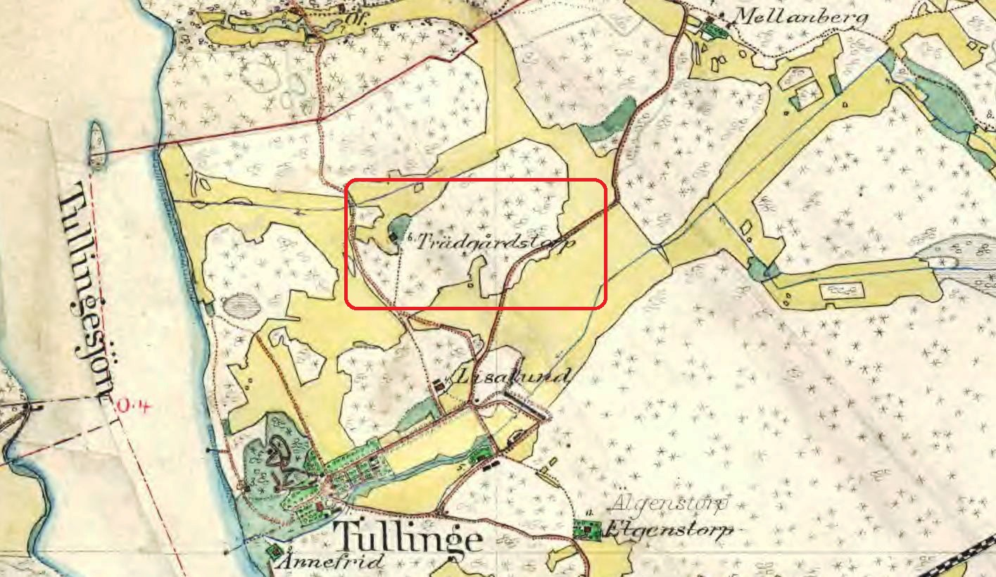 Trädgårdstorp, Mellanberg, Lisalund, Tullinge gård på Häradsekonomiska kartan